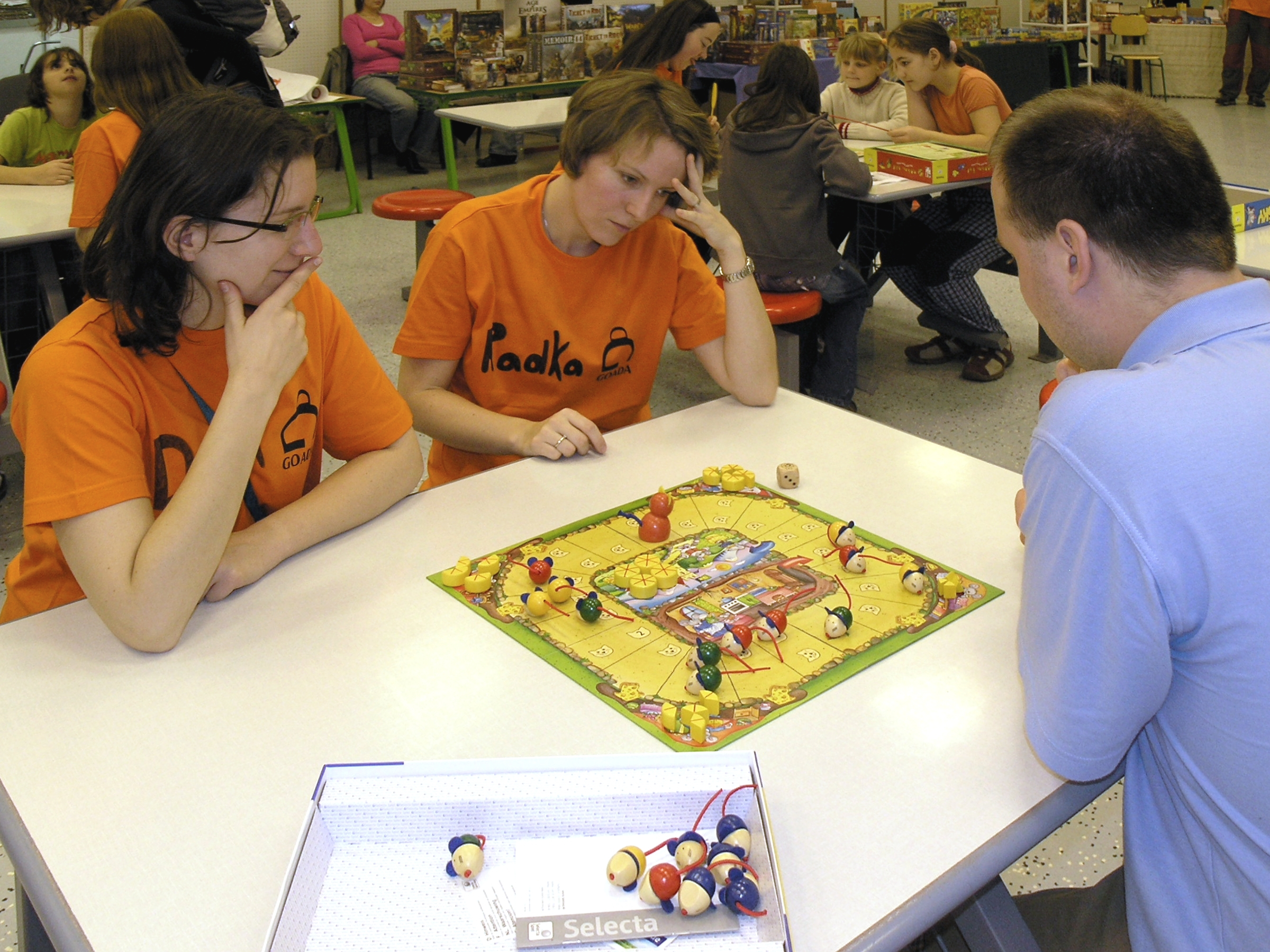 Goliáš a David 2008